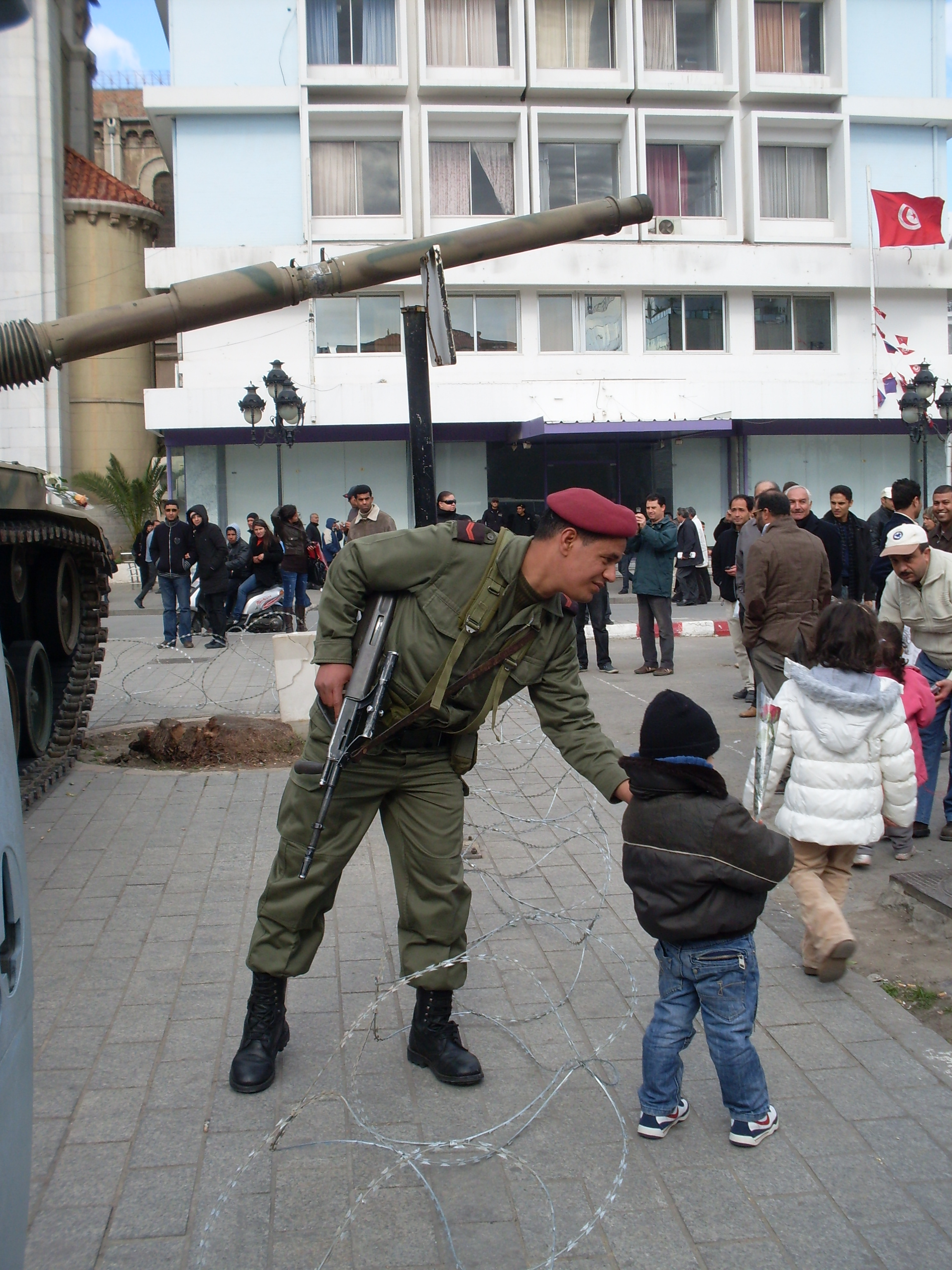 Un militaite tendant une rose à un enfant devant la cathédrale à l'avenue Habib Bourguiba lors de la révolution des Jasmins